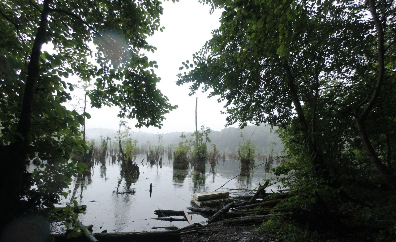 دریاچه ارواح یا دریاچه ممرز